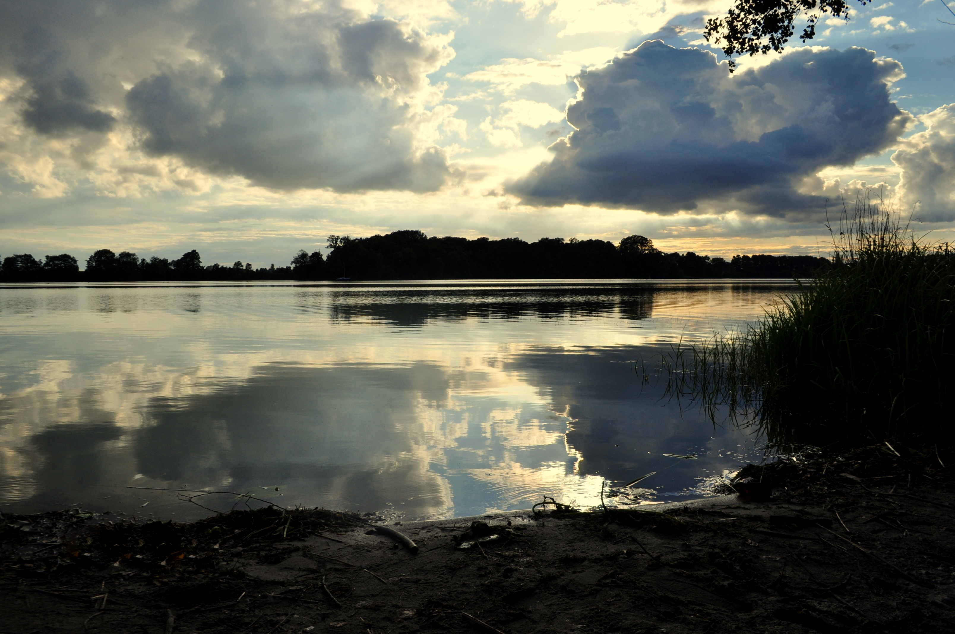 Park krajobrazowy Nadgoplański Park Tysiąclecia.